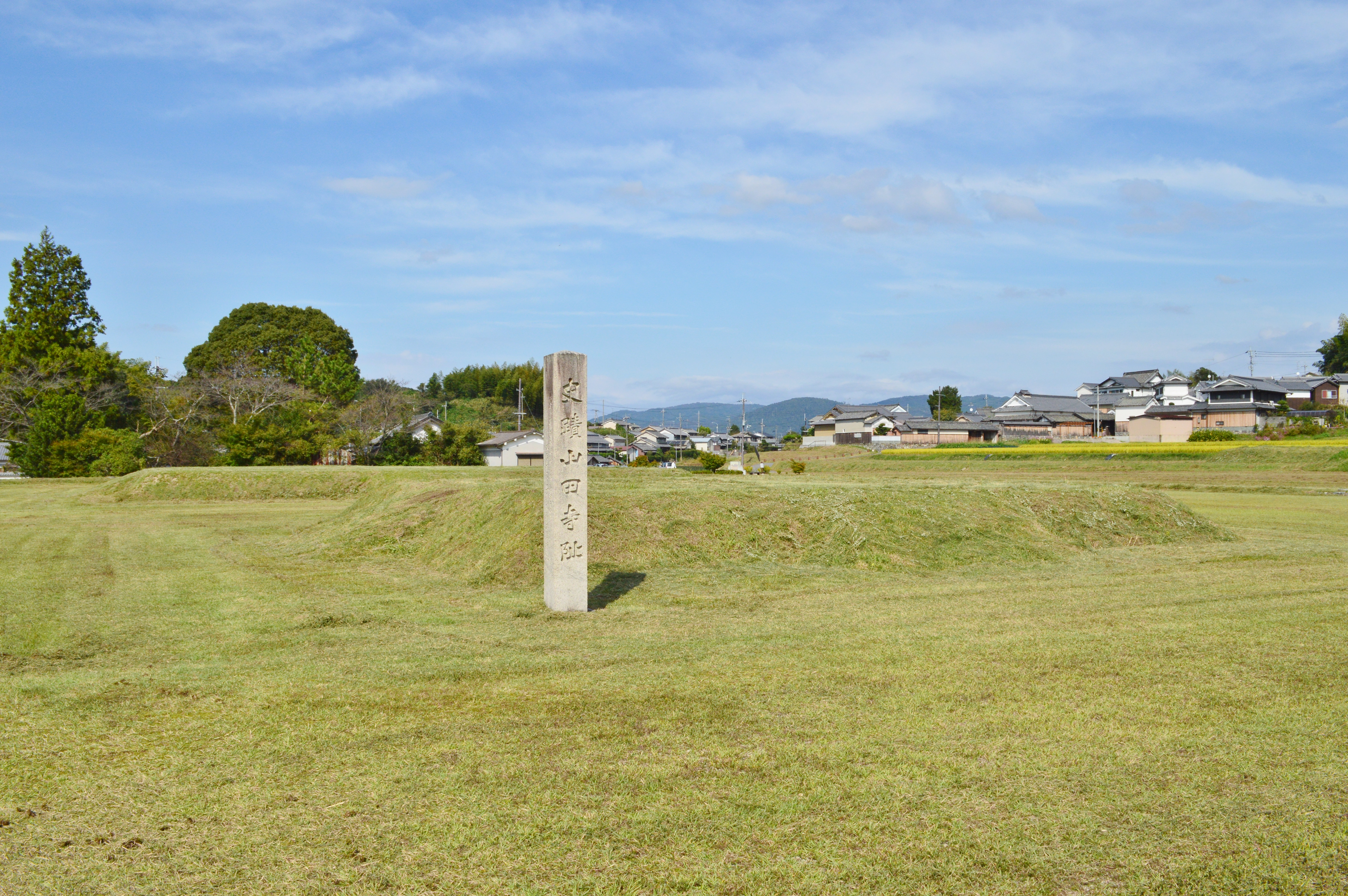 山田寺跡 塔・金堂